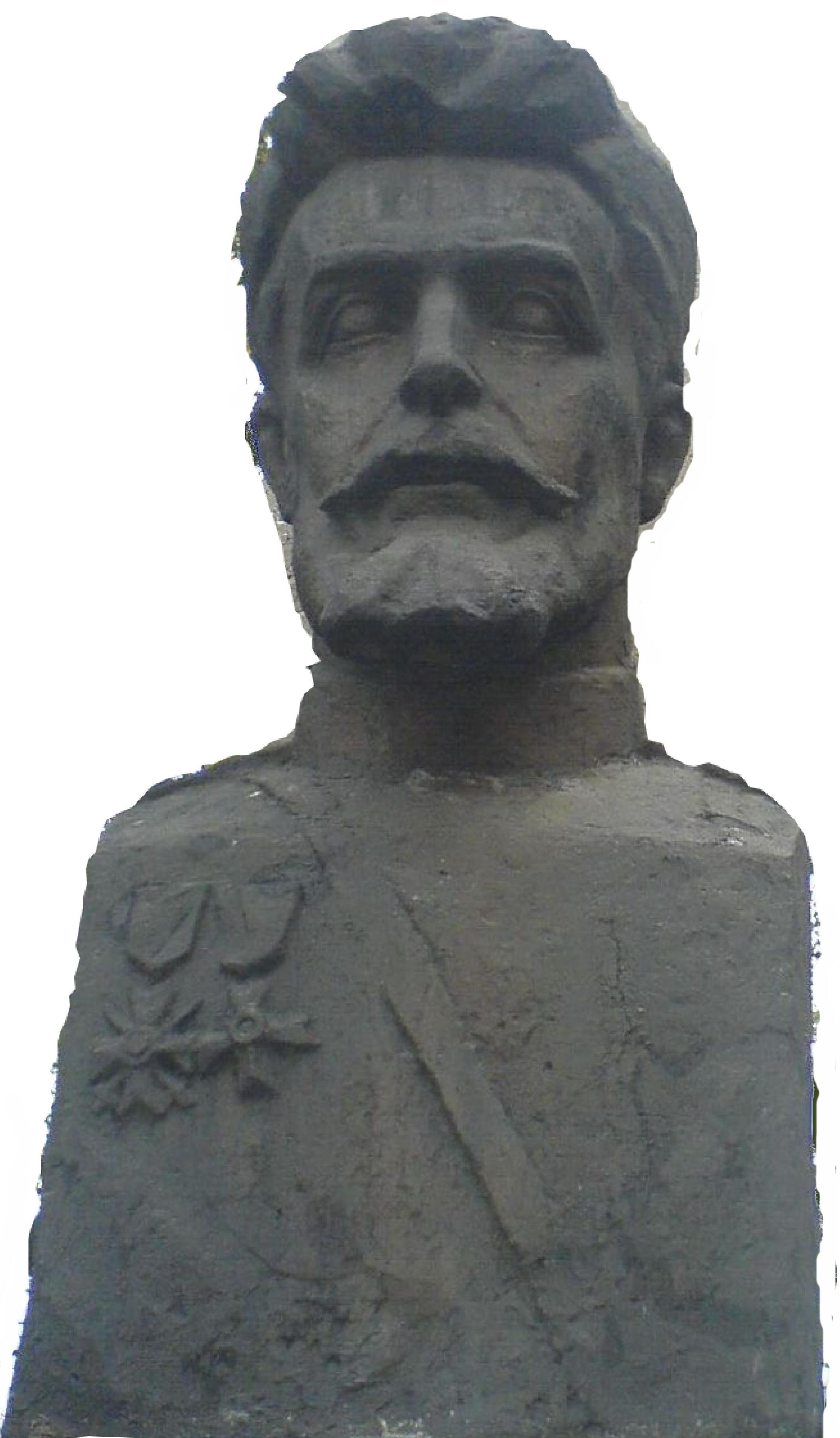 Бюст - Атанас Узунов, част от композицията "Паметника на капитаните" - Сливница Autor:Biser Todorov